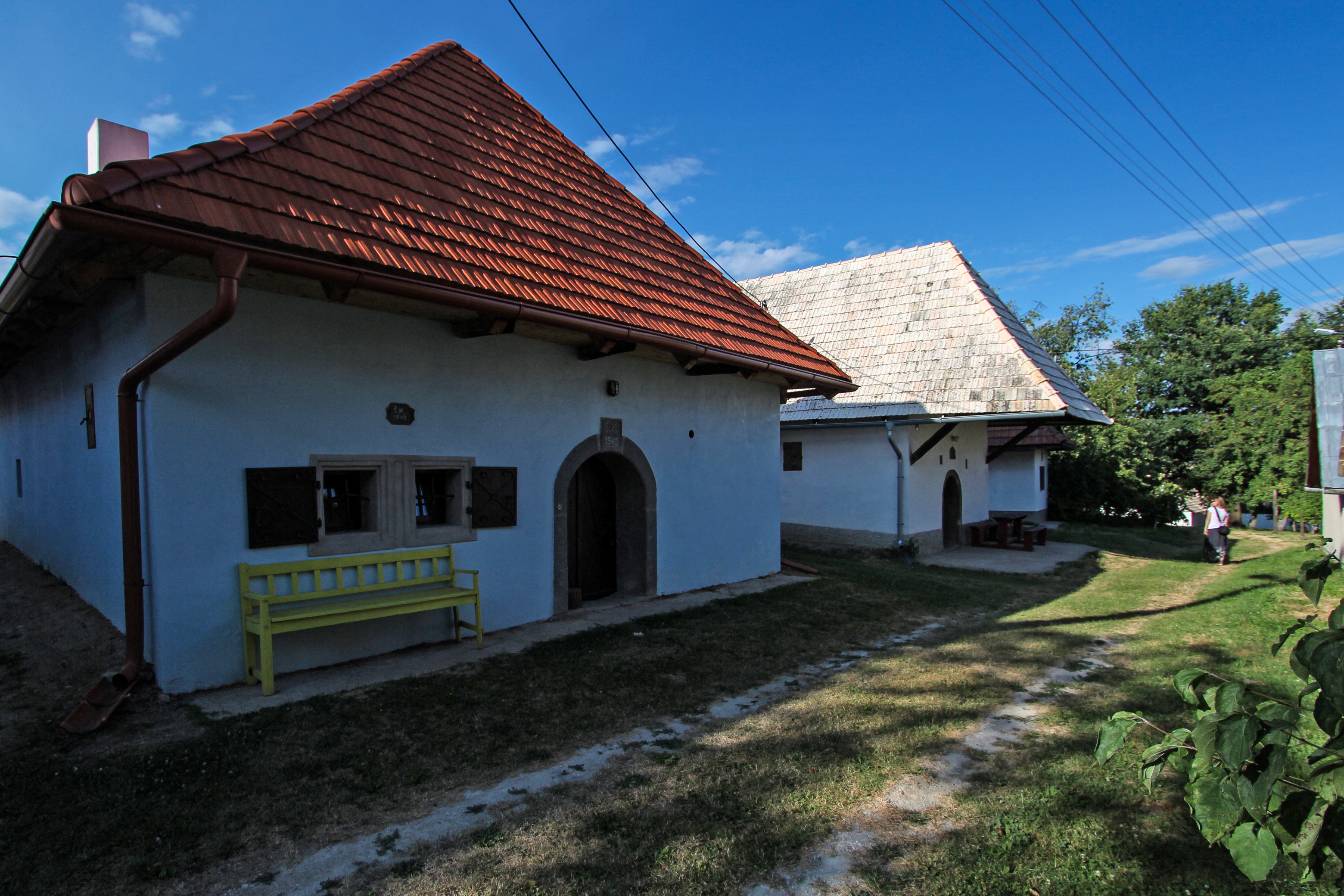 Sebechleby - Stará Hora, vinohradnícke domy